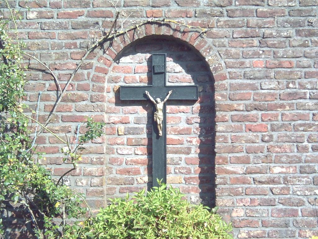 Limburgs: Klein-Kulle bie Ieëpe moerkruus